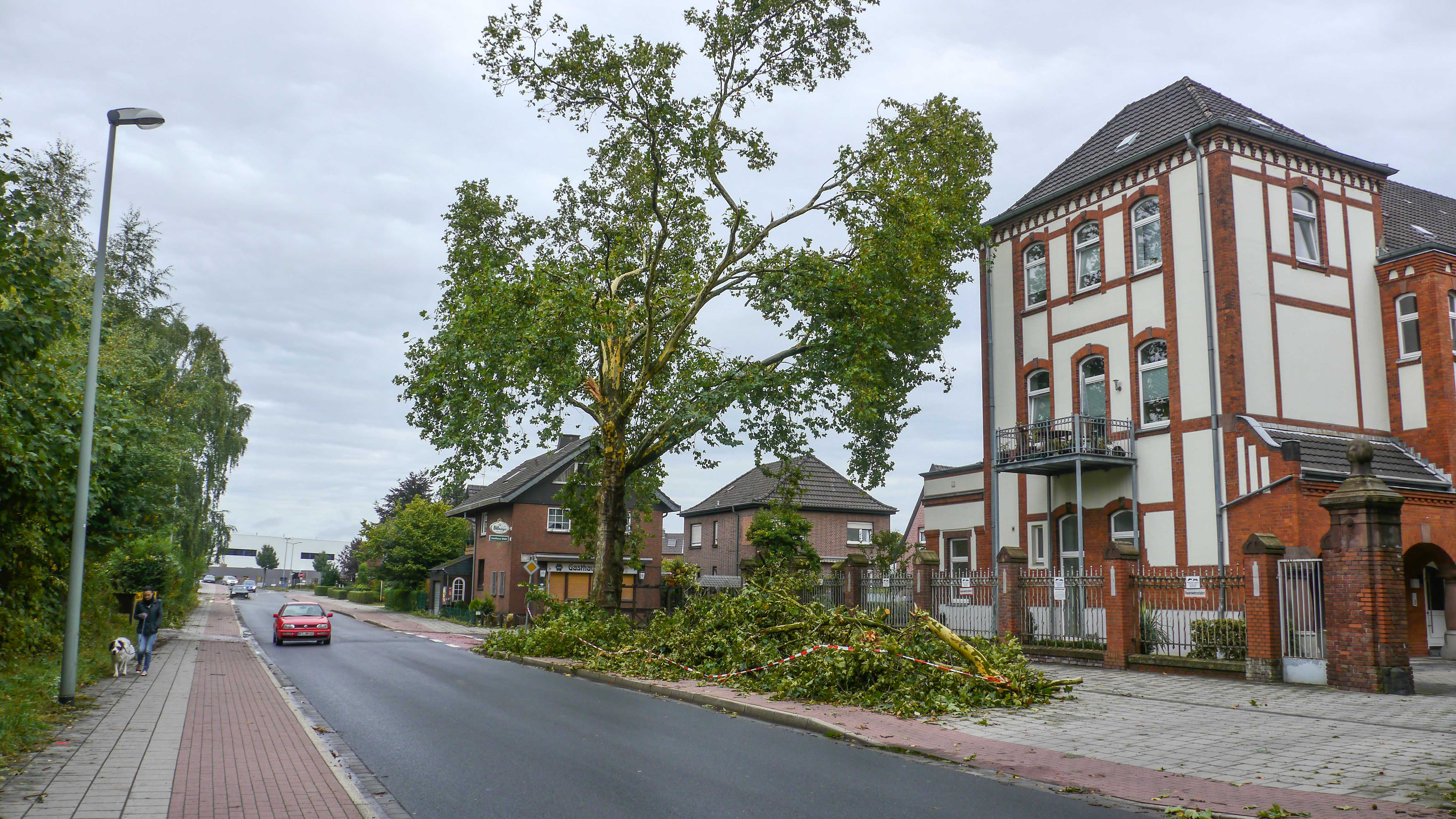 Vor der Reizensteinkaserne, nach dem Sturm vom 06.09.2013This is a photograph of an architectural monument., no. 77